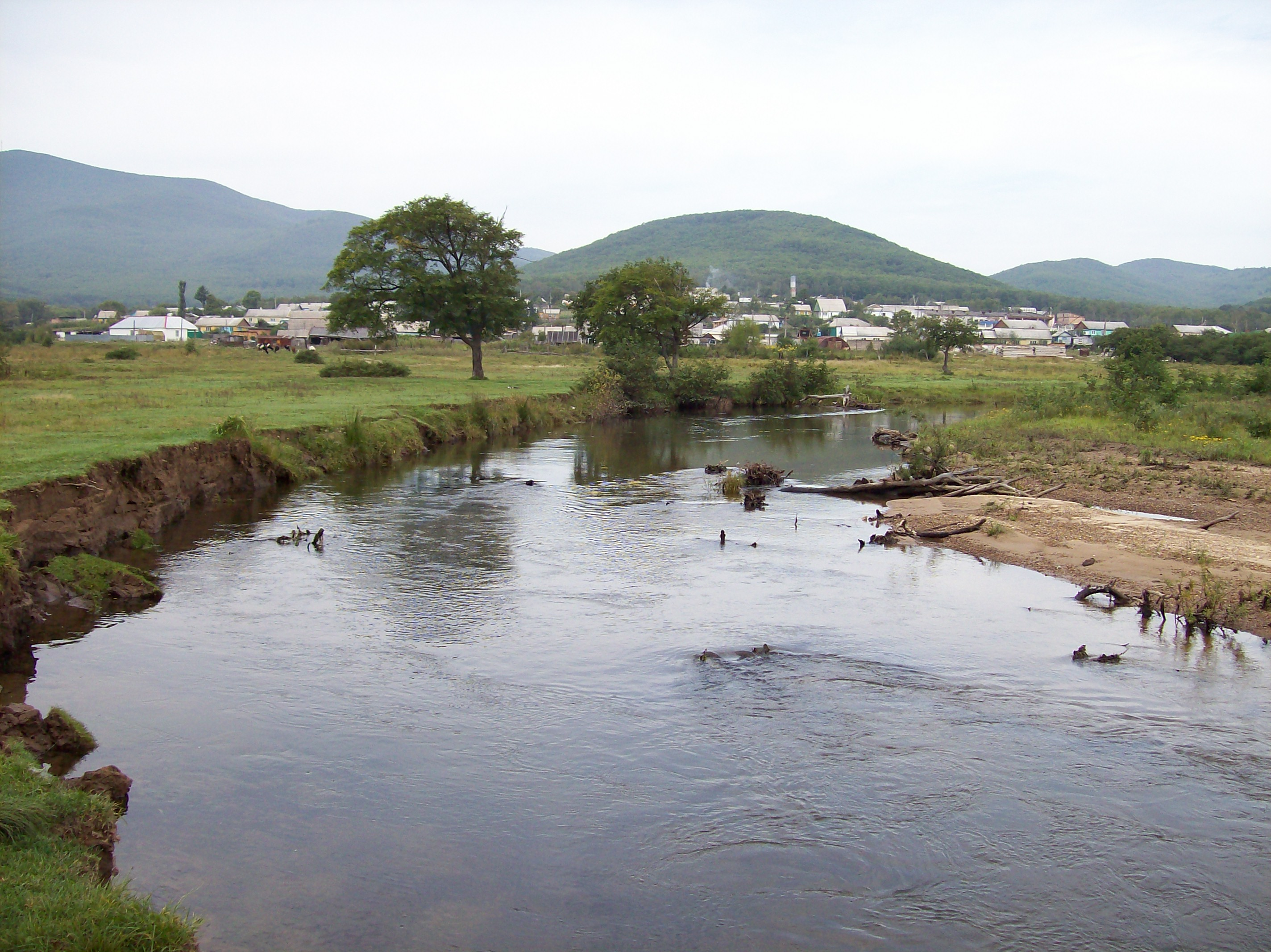 Поселок Ольга, река Ольга, Приморье.